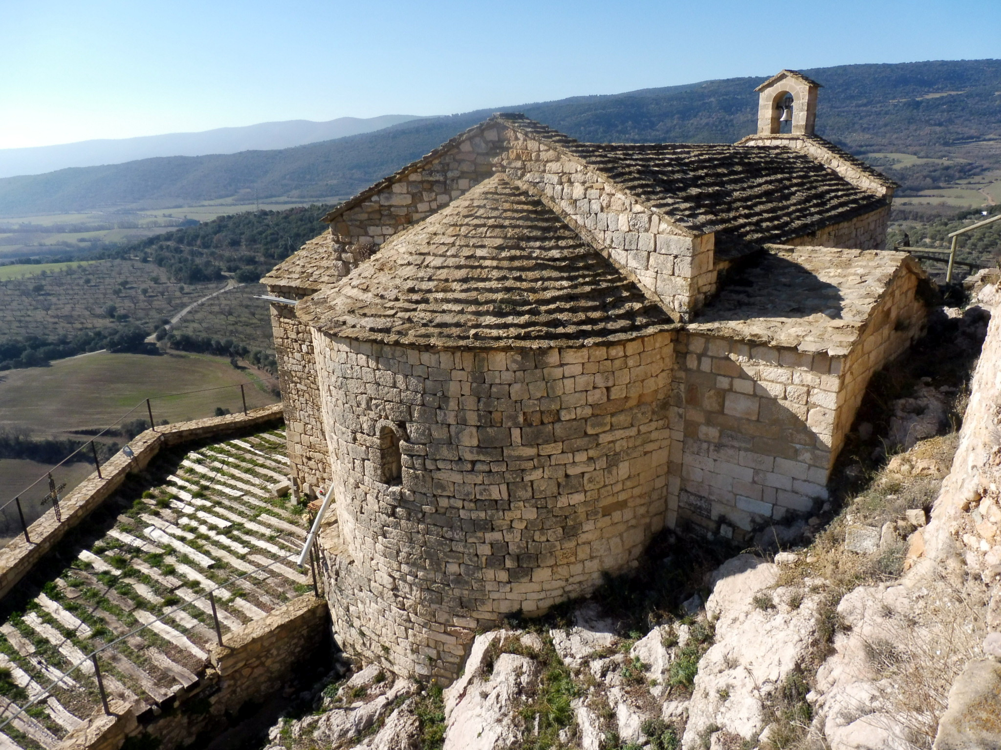 Església de Sant Miquel de Tartareu (les Avellanes i Santa Linya)